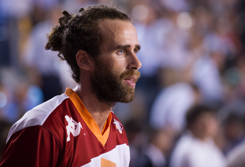 Gigi Datome